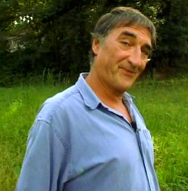 Le comédien Louis-Alexandre Fabre à Marseille.